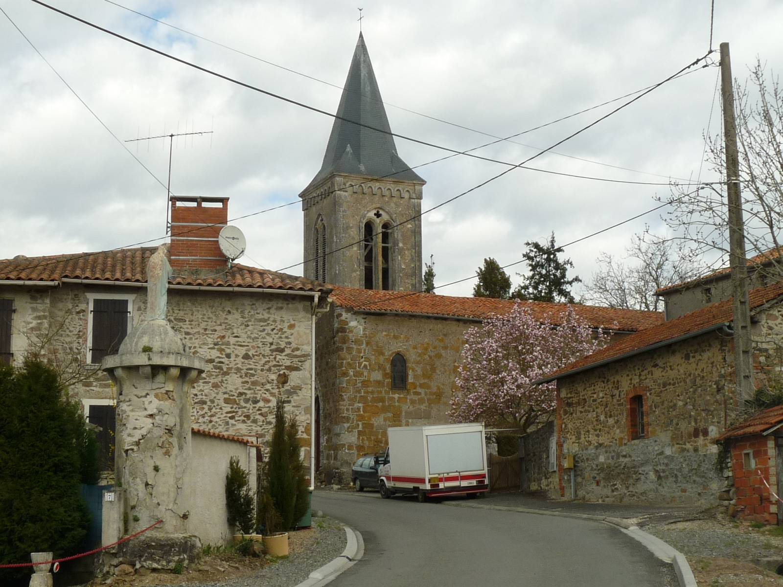 église de Loubert, Roumazières-Loubert, Charente, France